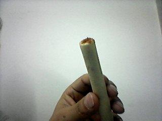 Cuchuflí chileno relleno con dulce de leche